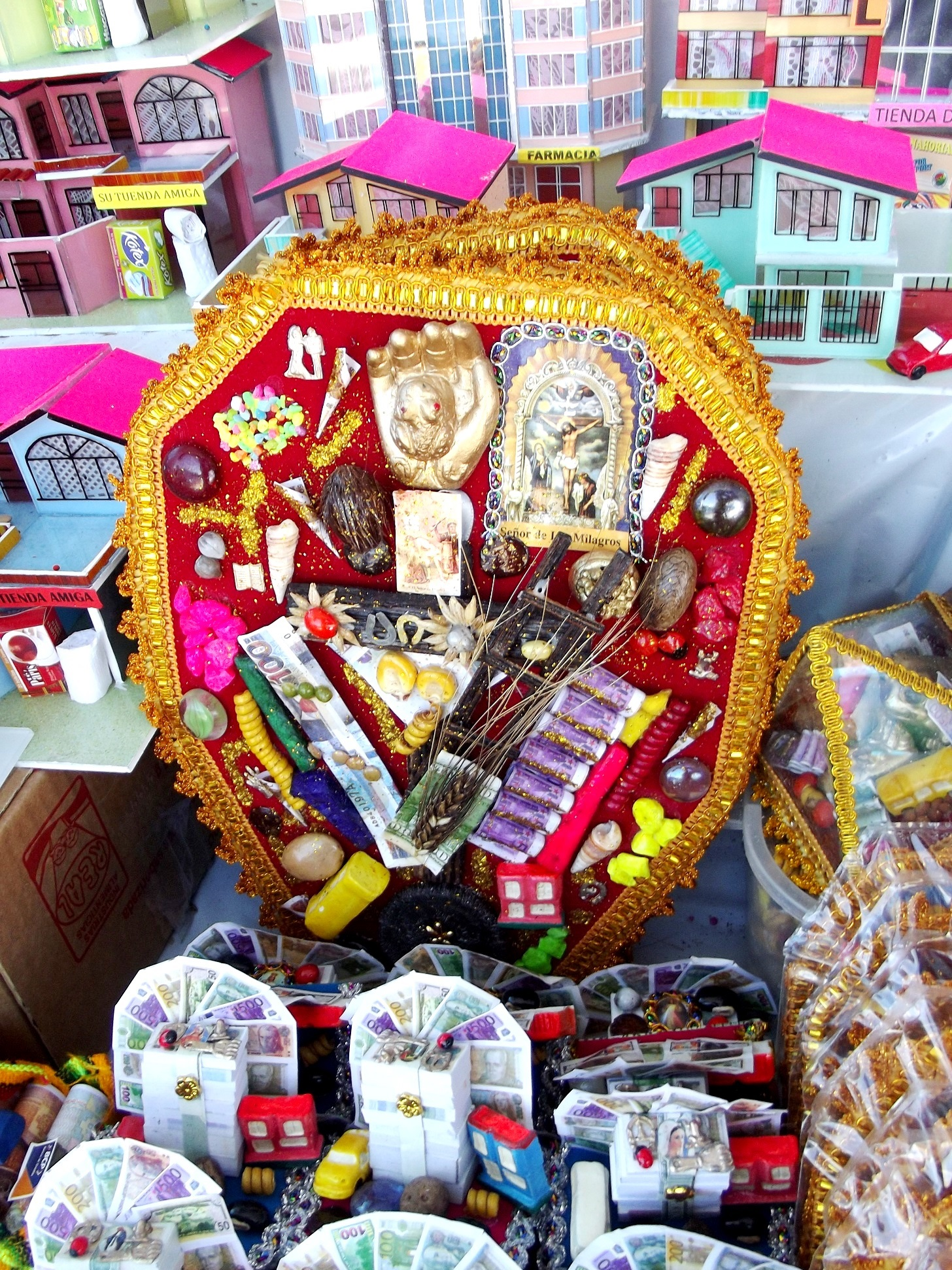 Altar de la Feria de Alasitas de Puno - Patrimonio Cultural de la Nacion - Perú